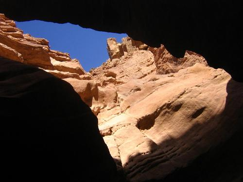 The Red Canyon הקניון האדום